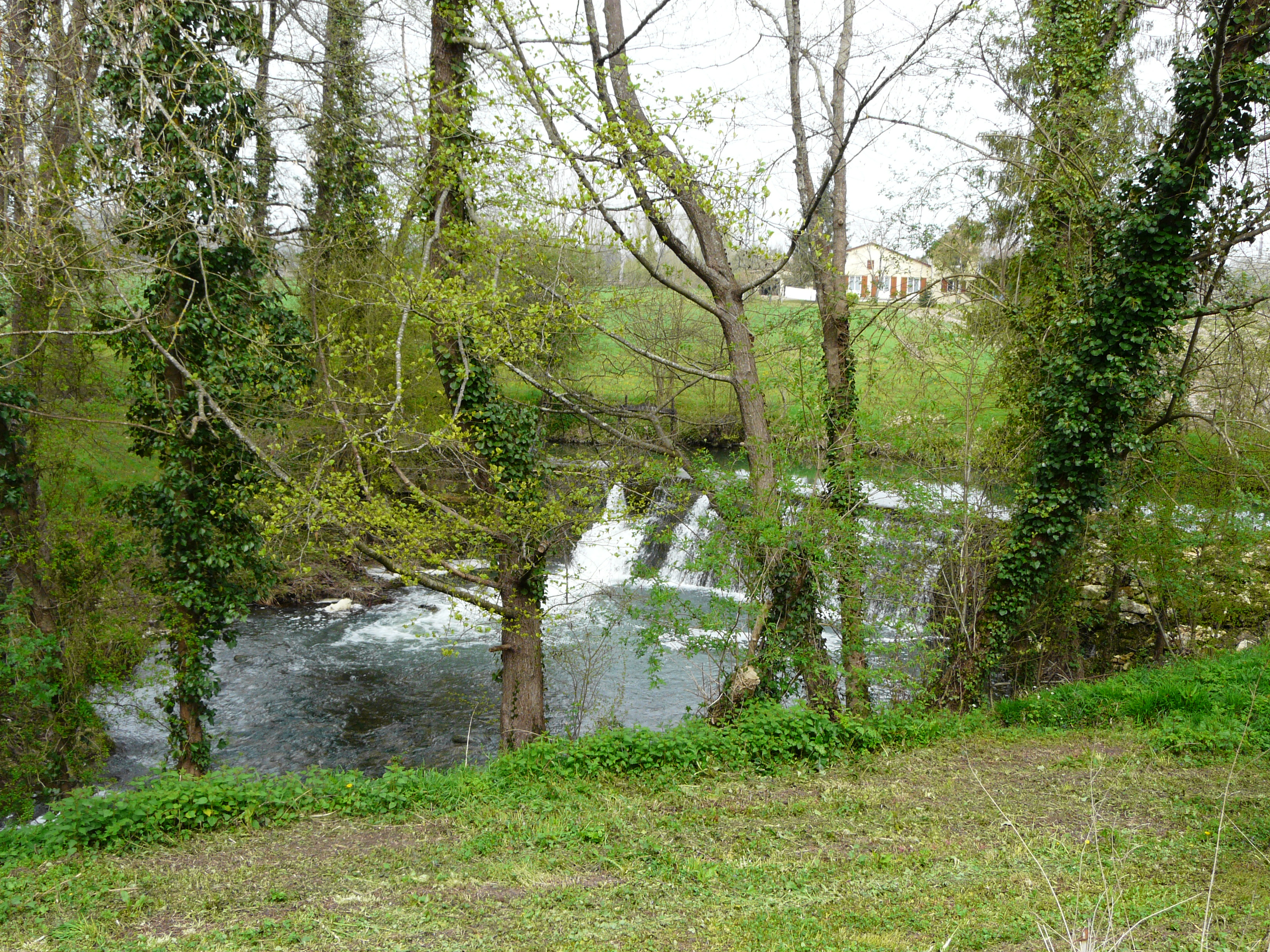 Le ruisseau de la Conne en aval du pont de la route départementale 37, Bergerac, Dordogne, France.